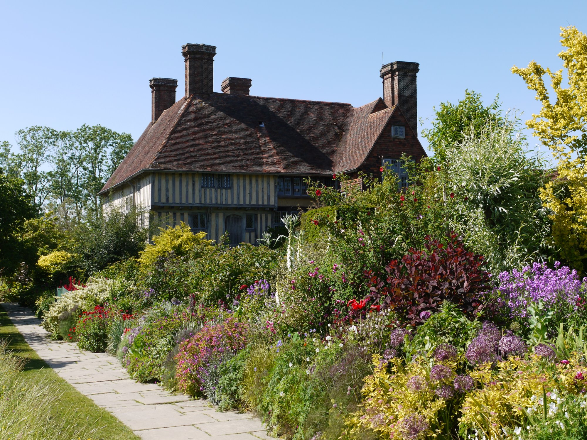 Im Süden des Hauses in Great Dixter wird durch die Long Border der Staudengarten abgeschlossen und geht in eine Blumenwiese über.